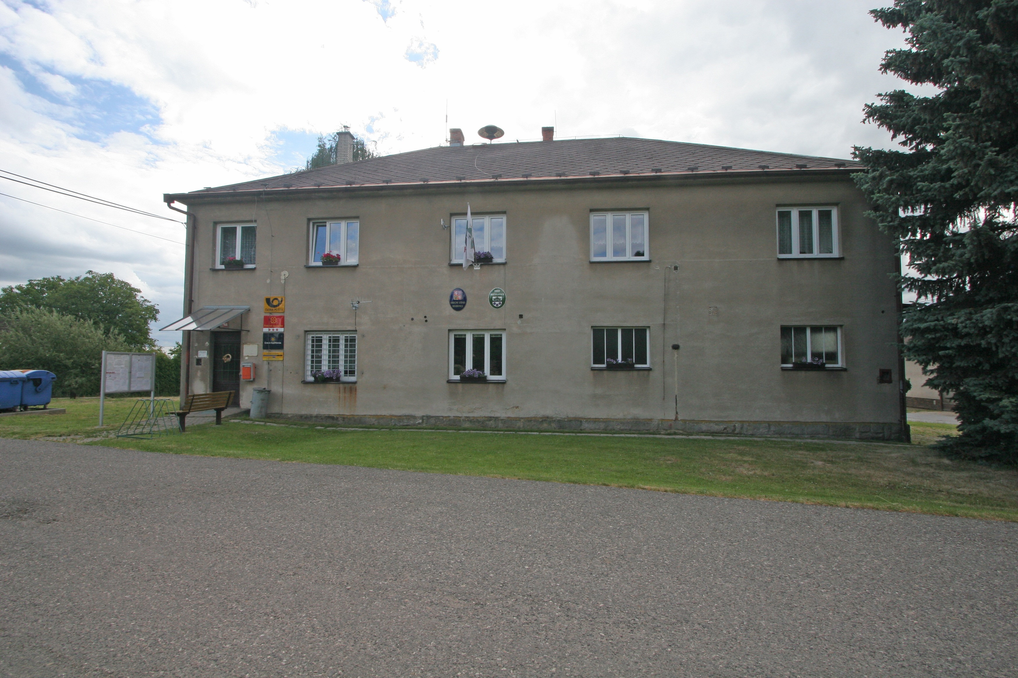 Doubravice obecní úřad